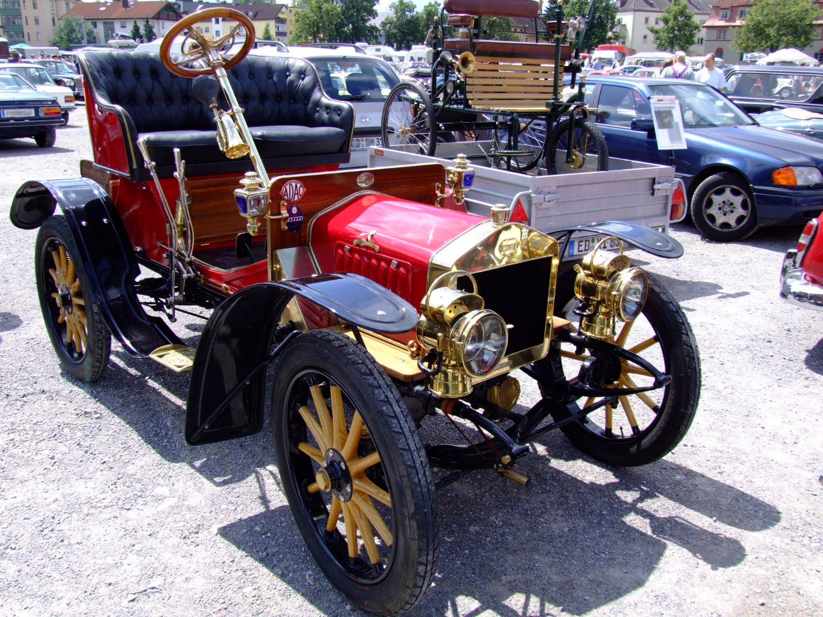 Quelle: selbst fotografiert, 07/2006 Fotograf: Späth Chr.